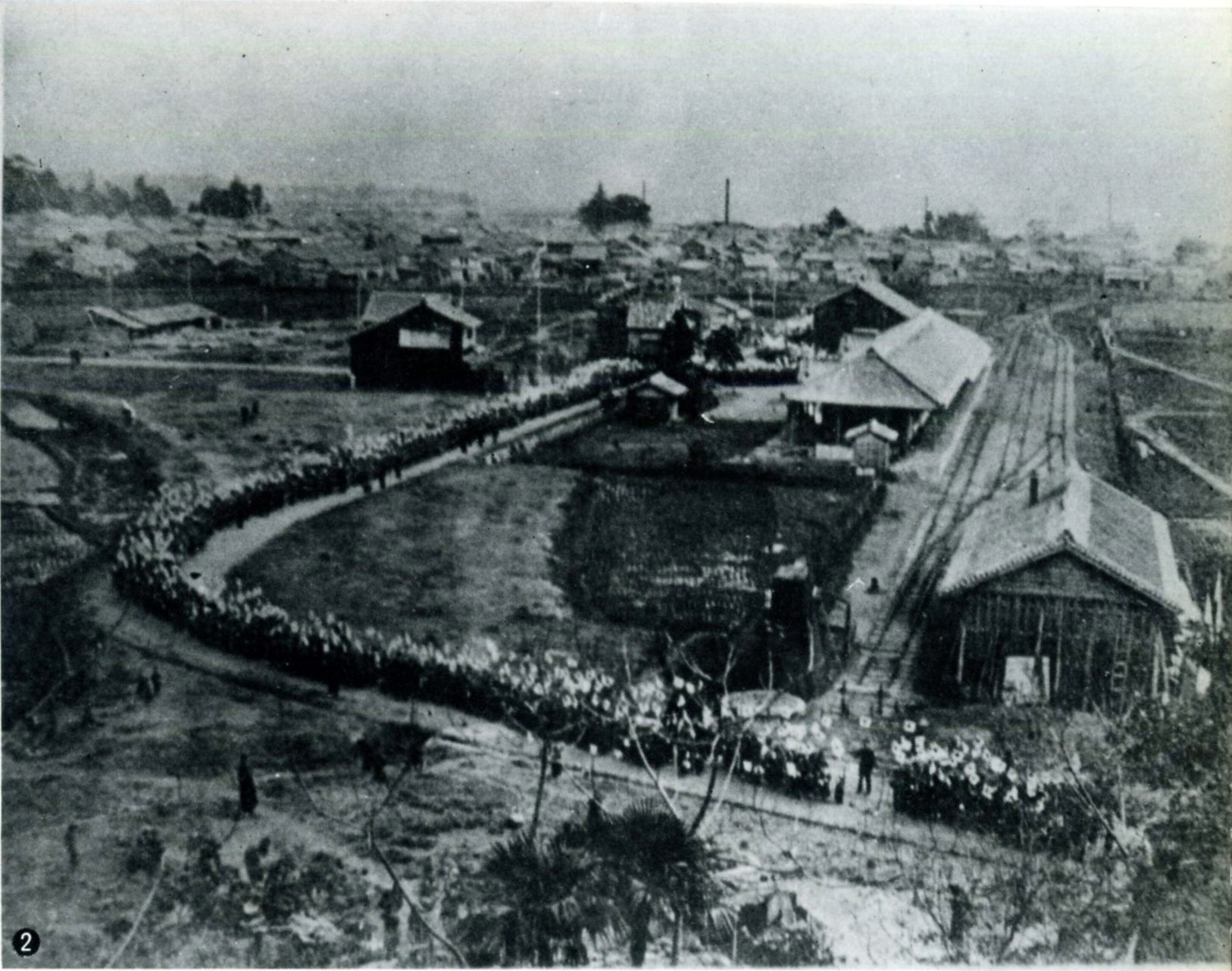 新宮駅開業風景。(紀勢本線、和歌山県新宮市)